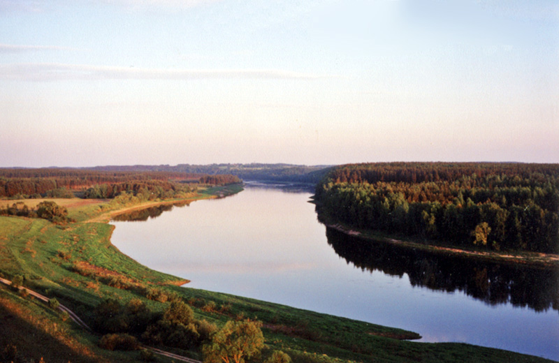 Daugava River upstreams from Daugavpils, Latvia